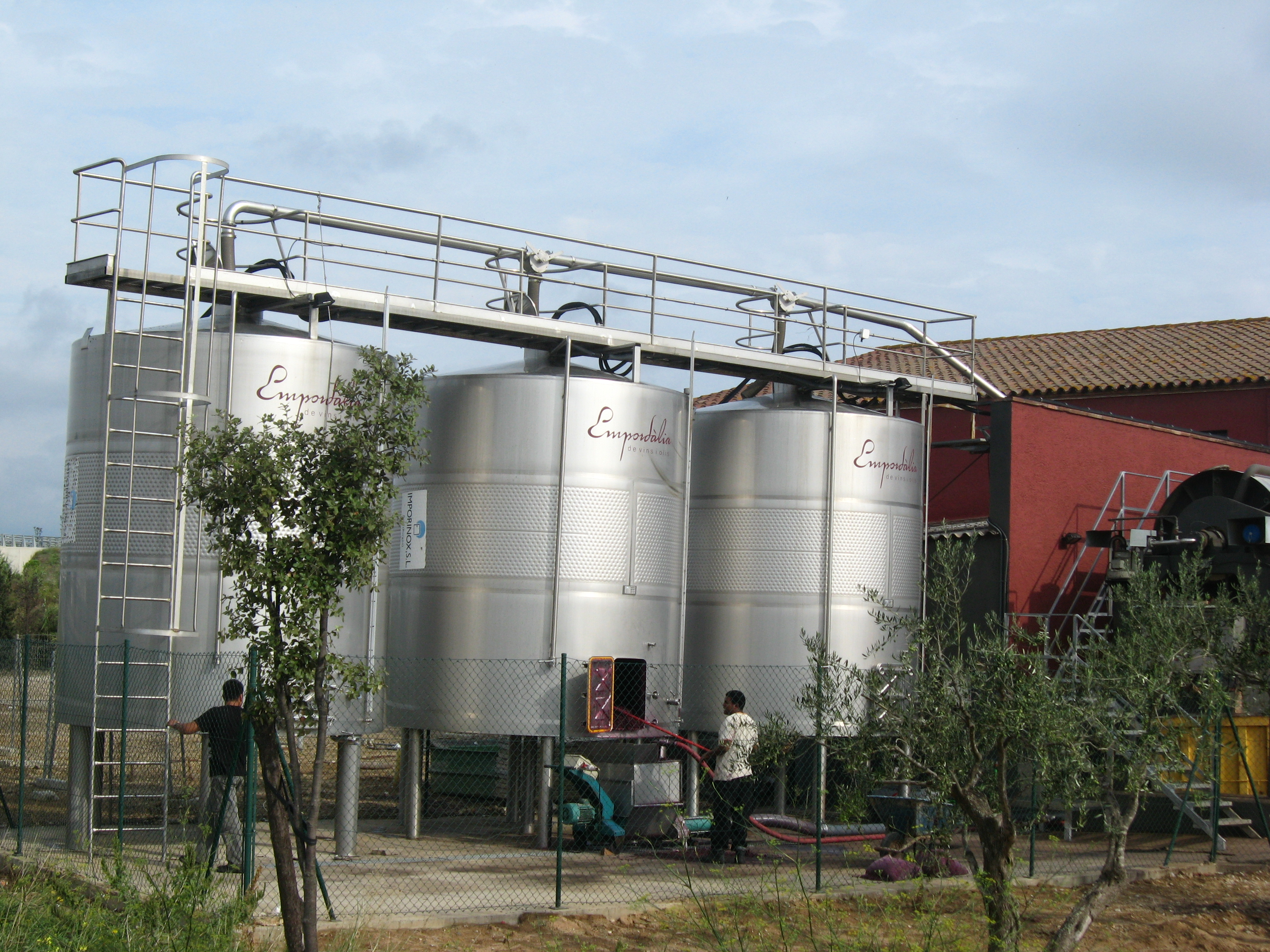 Weinkellerei in Vilajuïga Datum: 23.09.2010 Urheber: Michael Pfeiffer alias Benutzer:Gordito1869 Quelle: privates Fotoarchiv des Urhebers